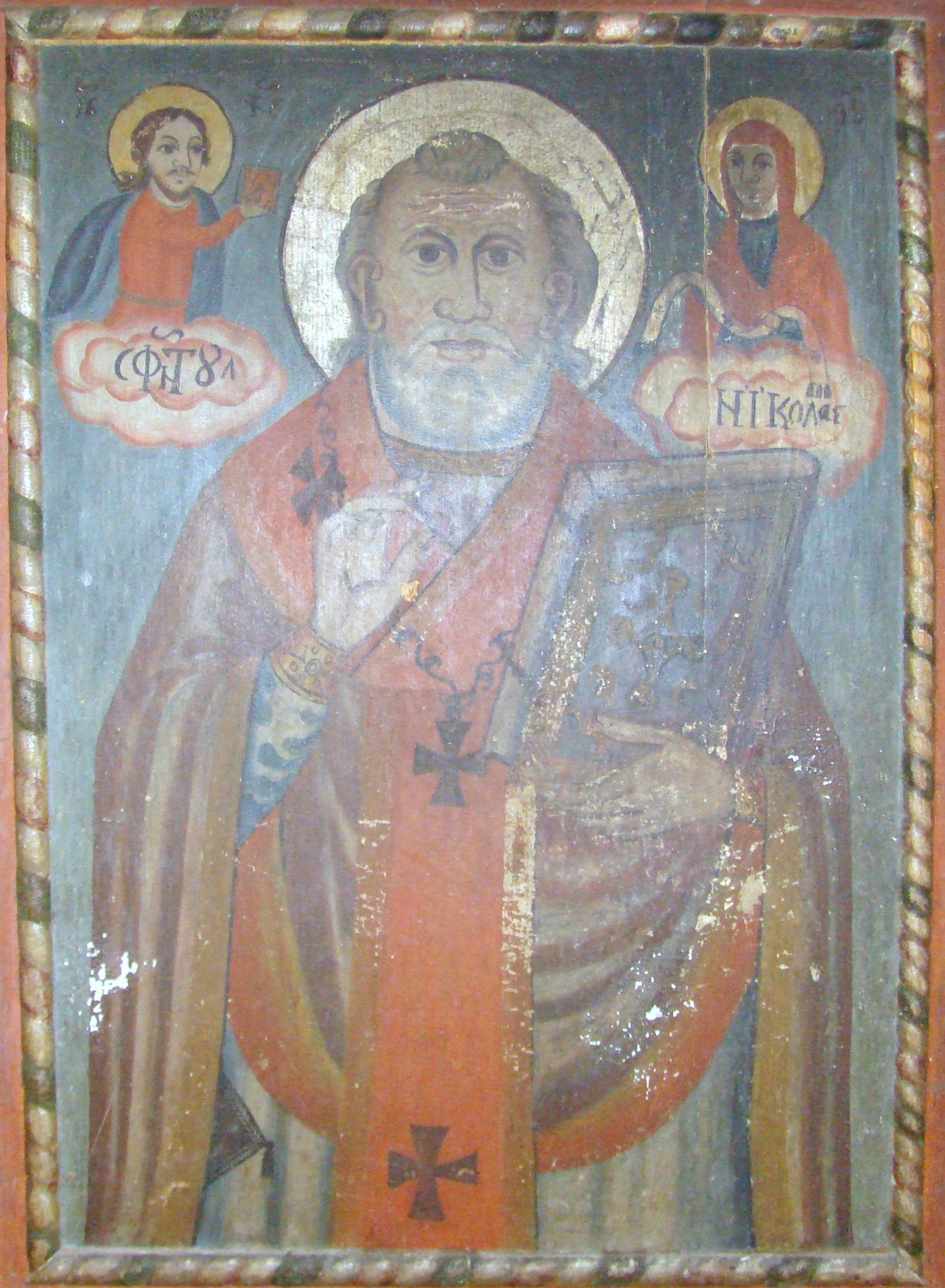 Biserica de lemn din Gârbău Dejului